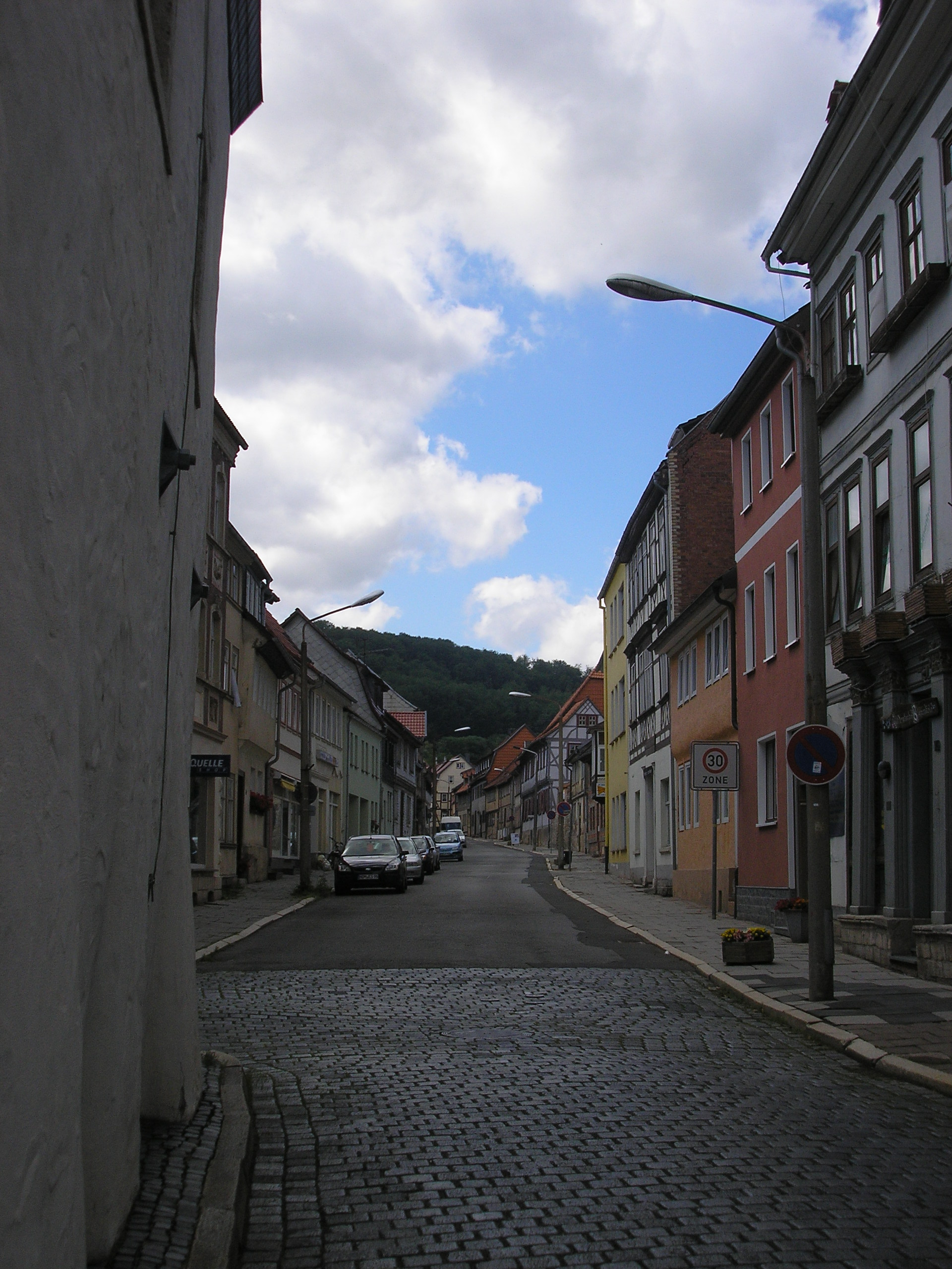 Die Hagenstraße in Bleicherode (Thüringen)